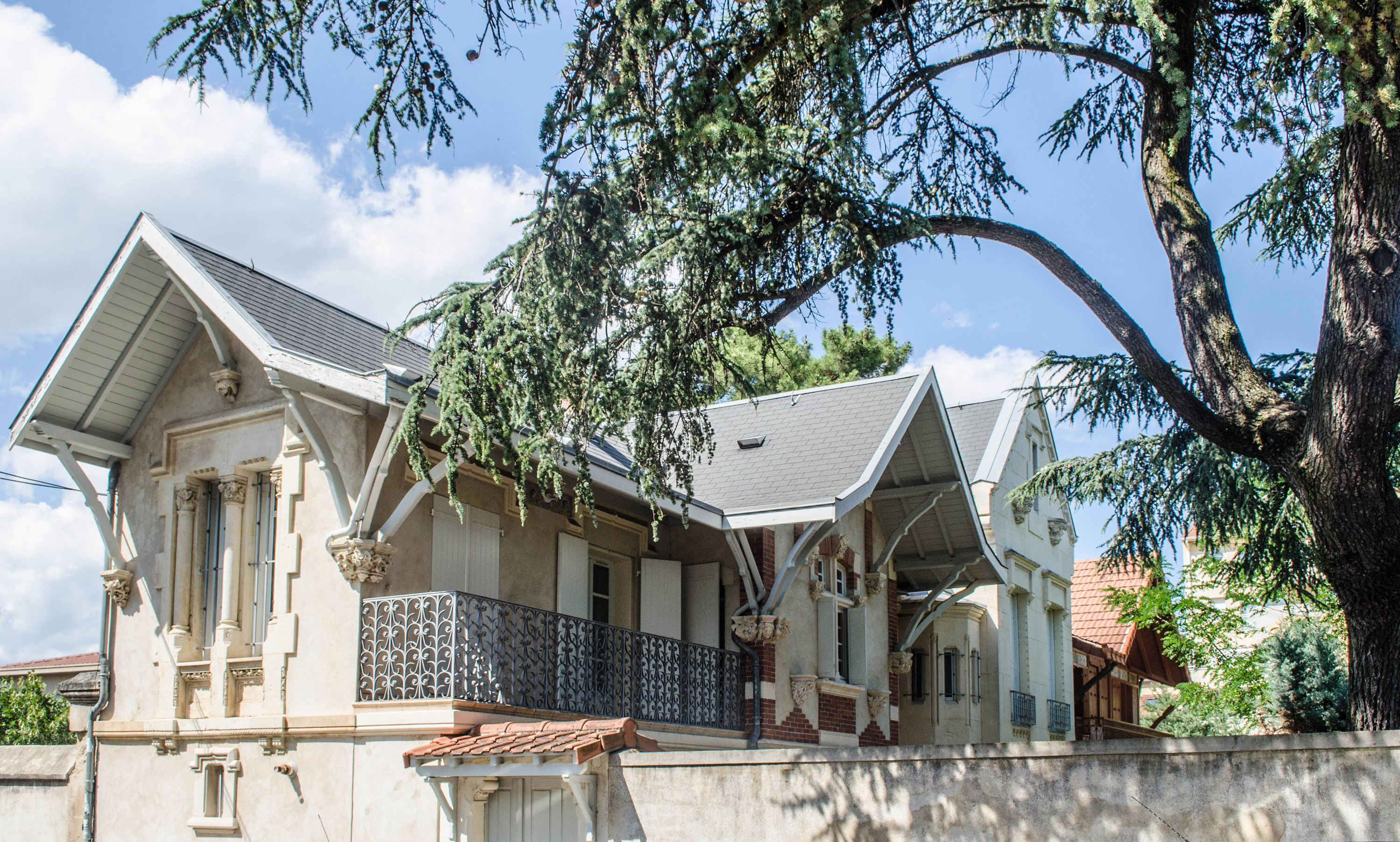 Valence (Drôme, France), Clos Genest, villa des Cigales